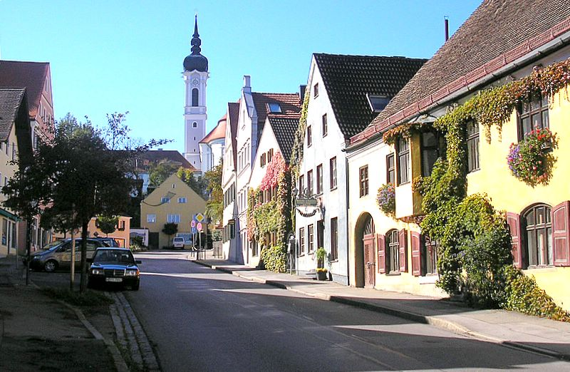 Marienmünster Dießen am Ammersee (Landkreis Landsberg, Oberbayern). Der Glockenturm über dem Ort. Eigene Aufnahme, Okt. 2006 / Minster St. Mary at Diessen (Upper Bavaria, Germany). View to the tower. Own photo, Oct. 2006